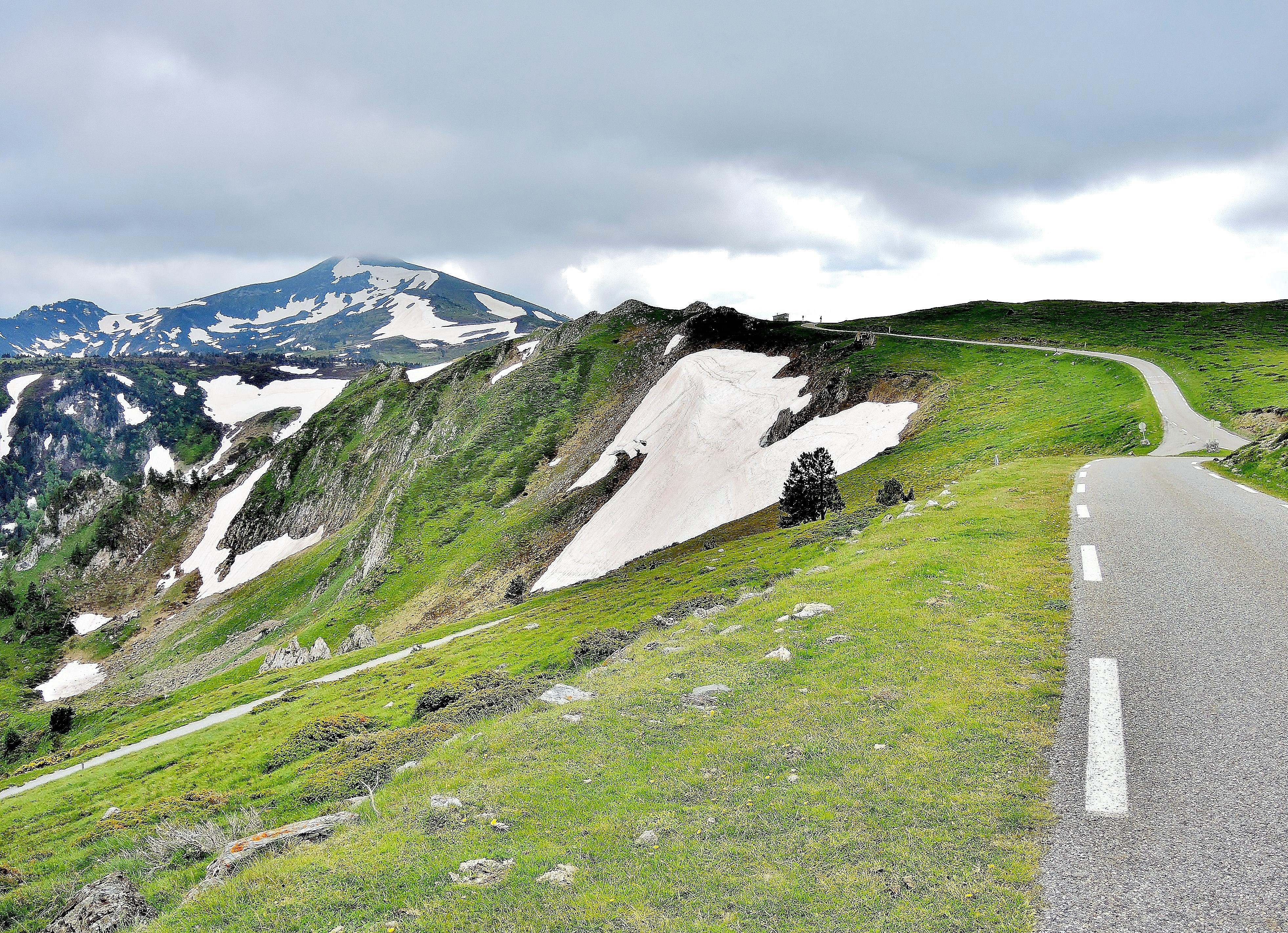 Port de Pailhères. Mijanès. Ariège